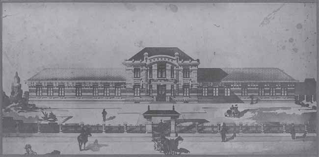 Ilustración maqueta de la fachada del Jardín de Infantes n° 213 "Enriqueta Compte y Riqué", presentada con el proyecto de su construcción. Propiedad del Museo de Enriqueta Compte y Riqué, Jardín de Infantes n° 213. CEIP.